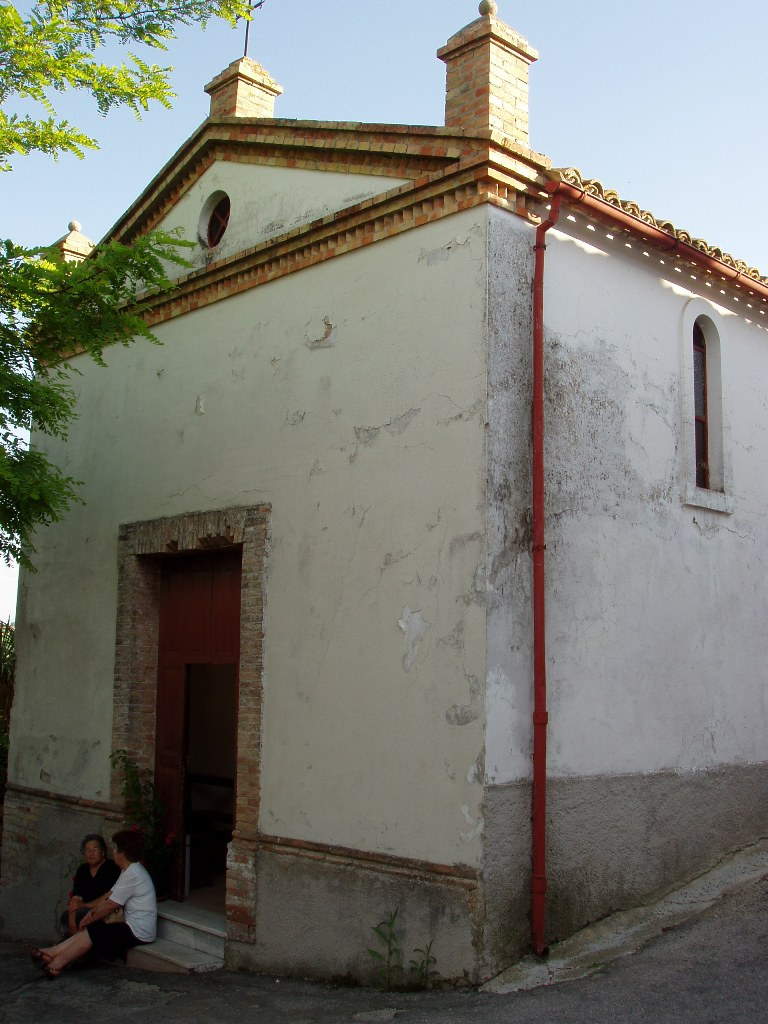 La chiesa di Monticelli (Teramo). Foto di Lucio De Marcellis